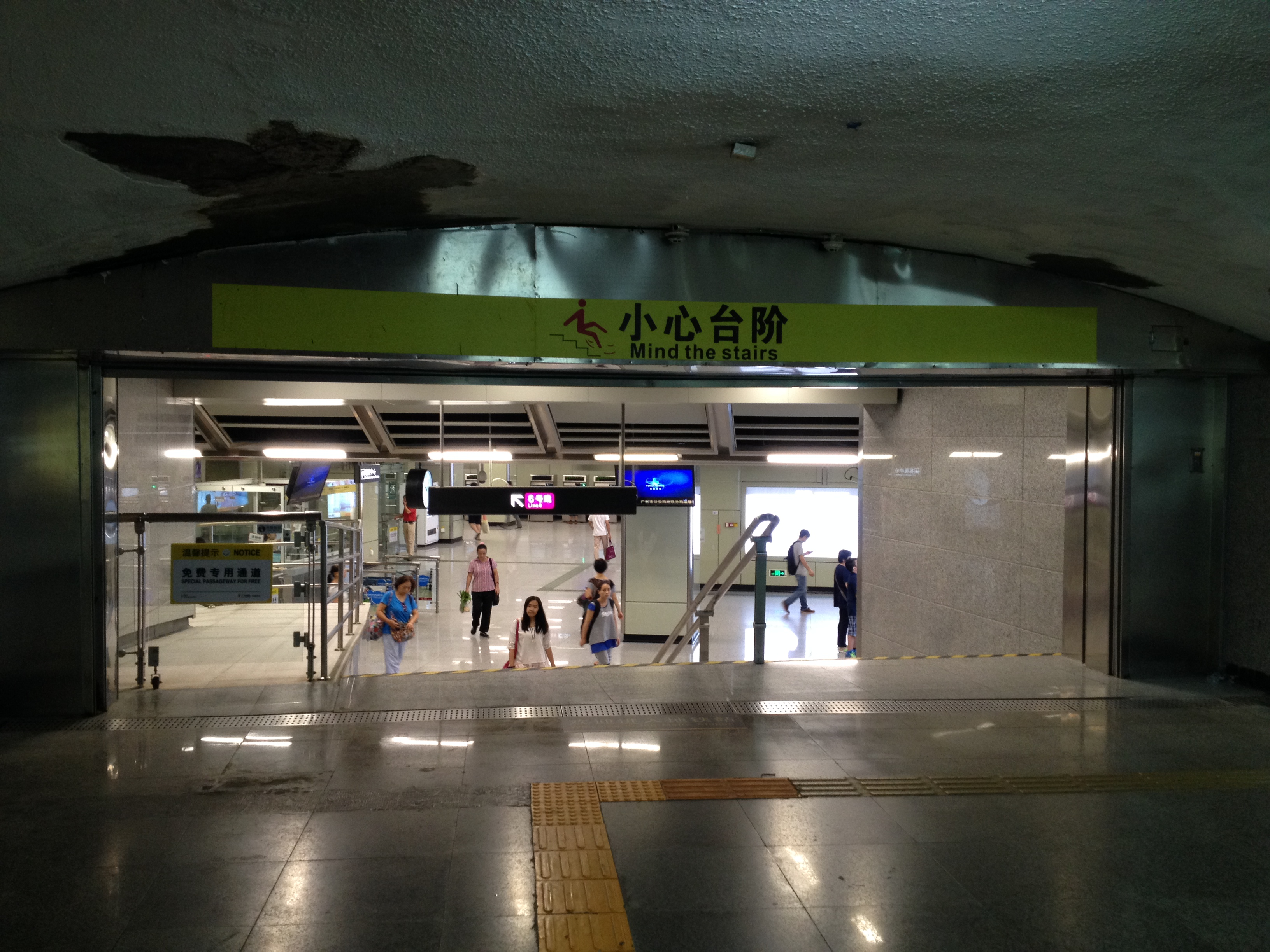 广州地铁东山口站行人过街通道出入口